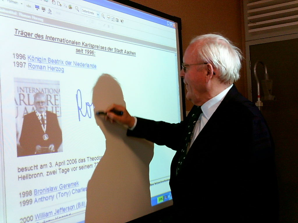 Roman Herzog (* 1934), deutscher Jurist und Politiker, Bundespräsident von 1994 bis 1999